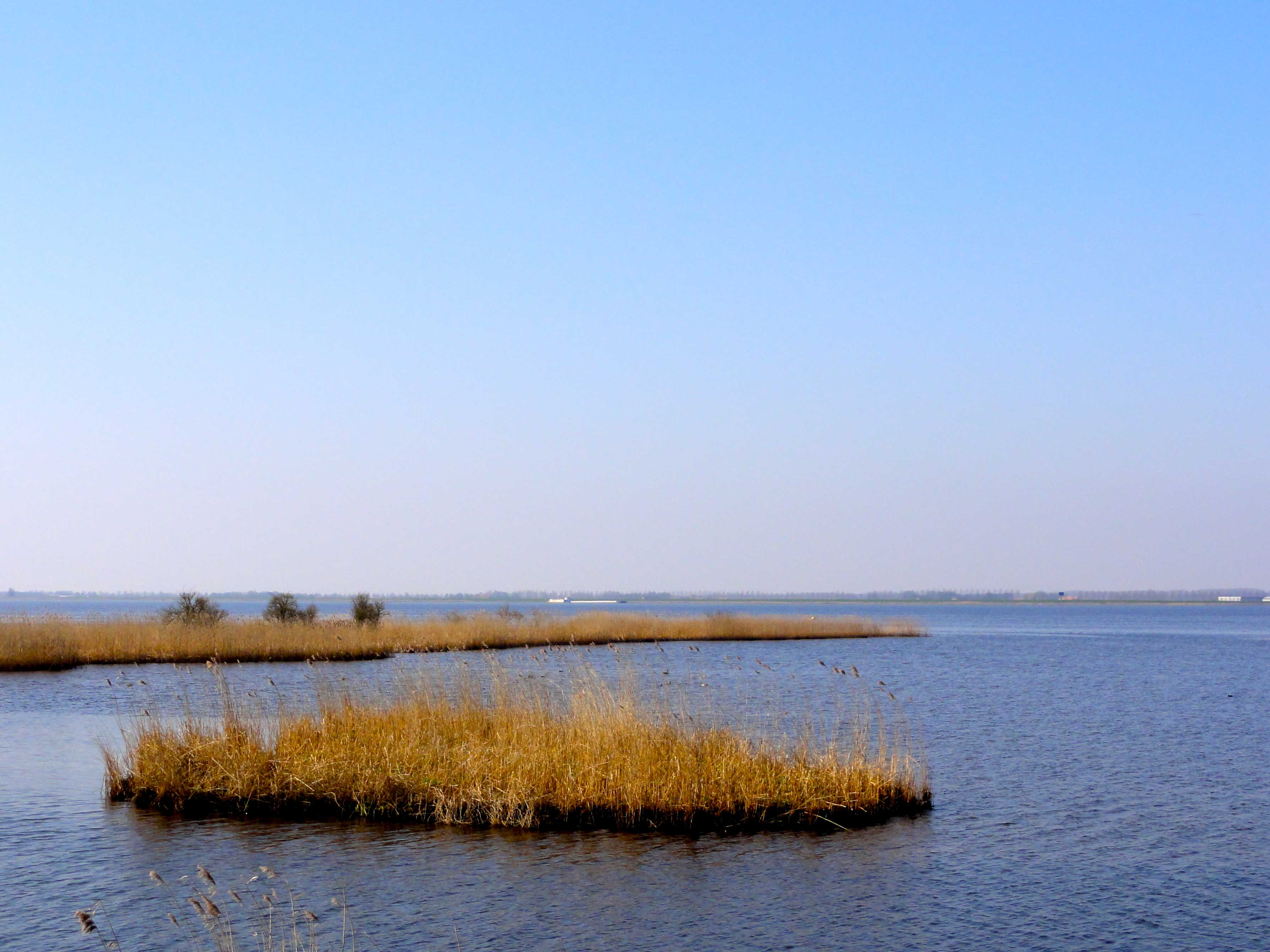 Biezenvelden (mattenbiezen) in het Zwarte Meer